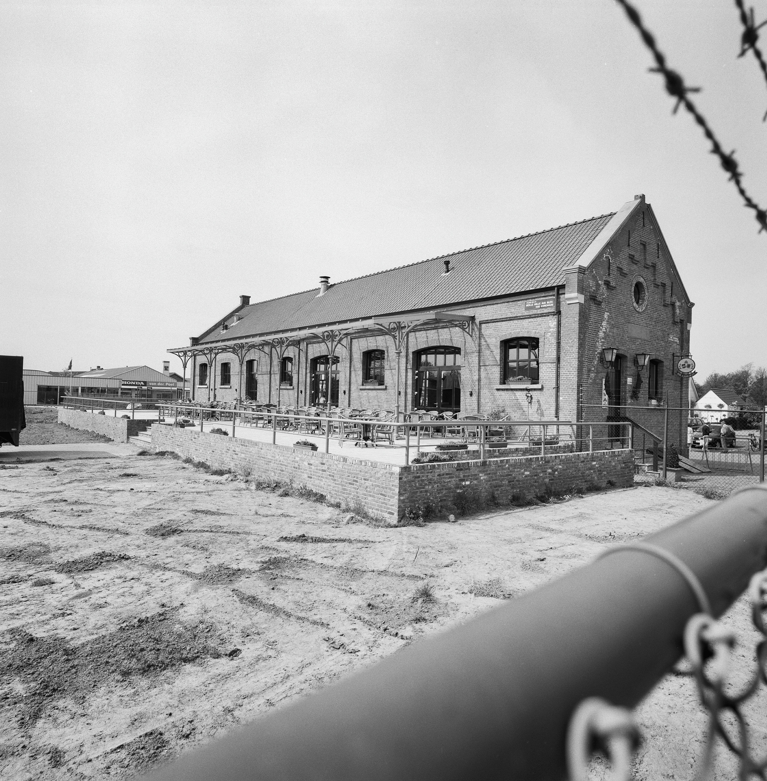 Voormalig Station Hulst: Overzicht achtergevel en linker zijgevel, remisegebouw (opmerking: Gefotografeerd voor Monumenten In Nederland Zeeland, bladzijde 137)